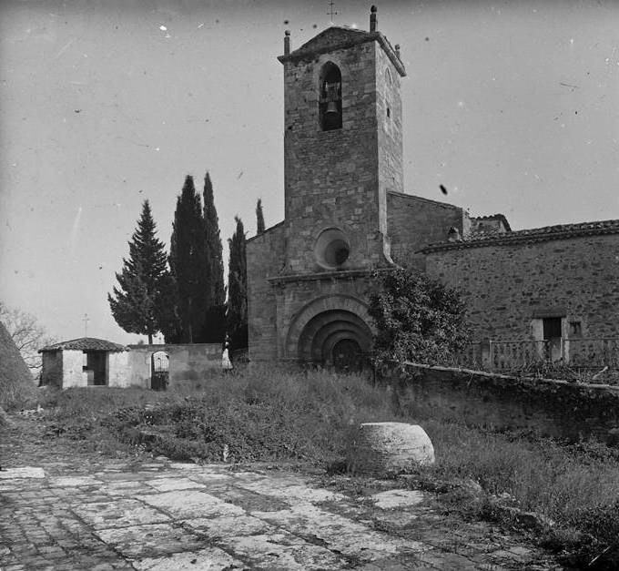 Vista de l ' església de Santa Maria de Porqueres